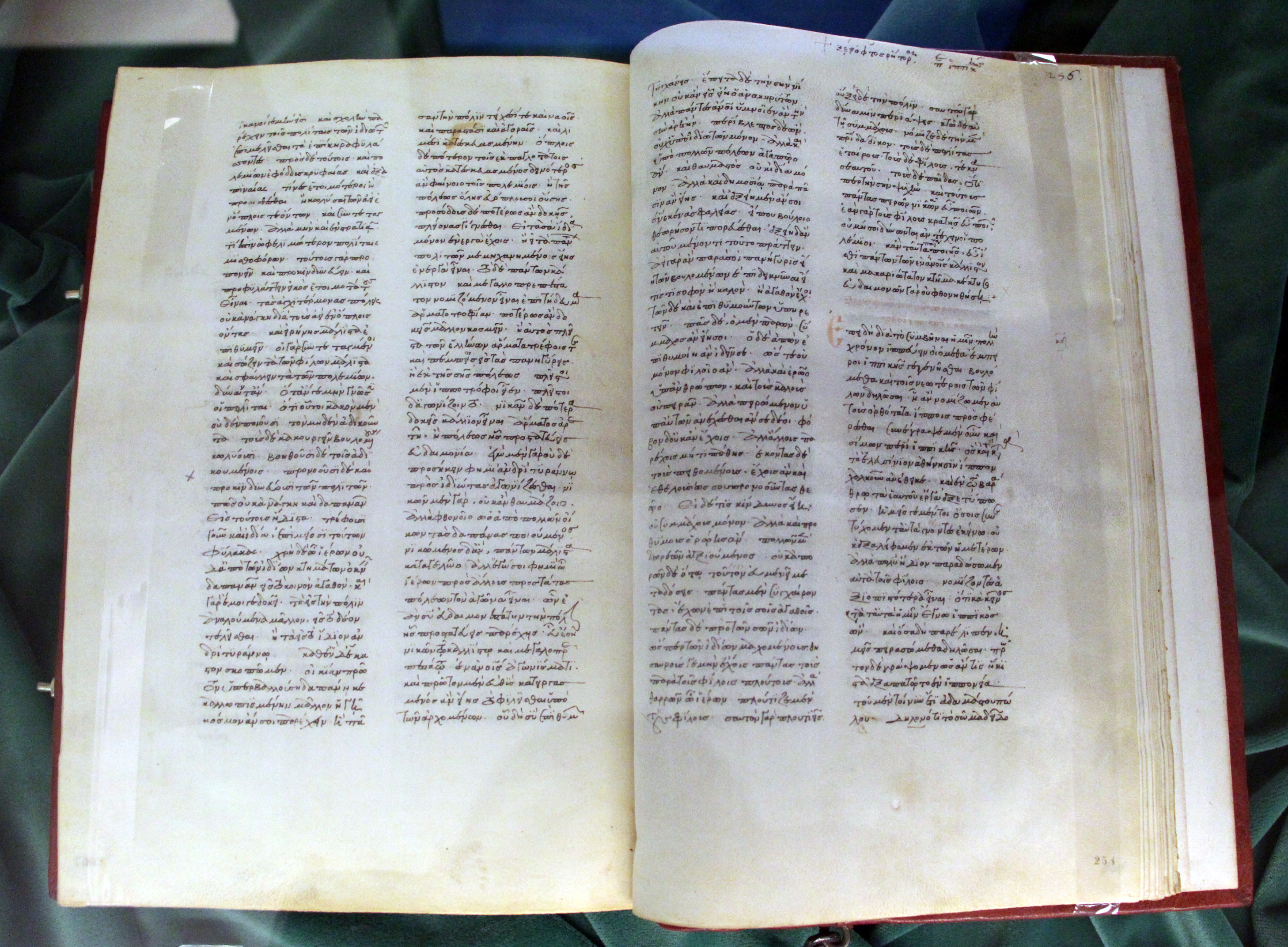 Biblioteca Medicea Laurenziana